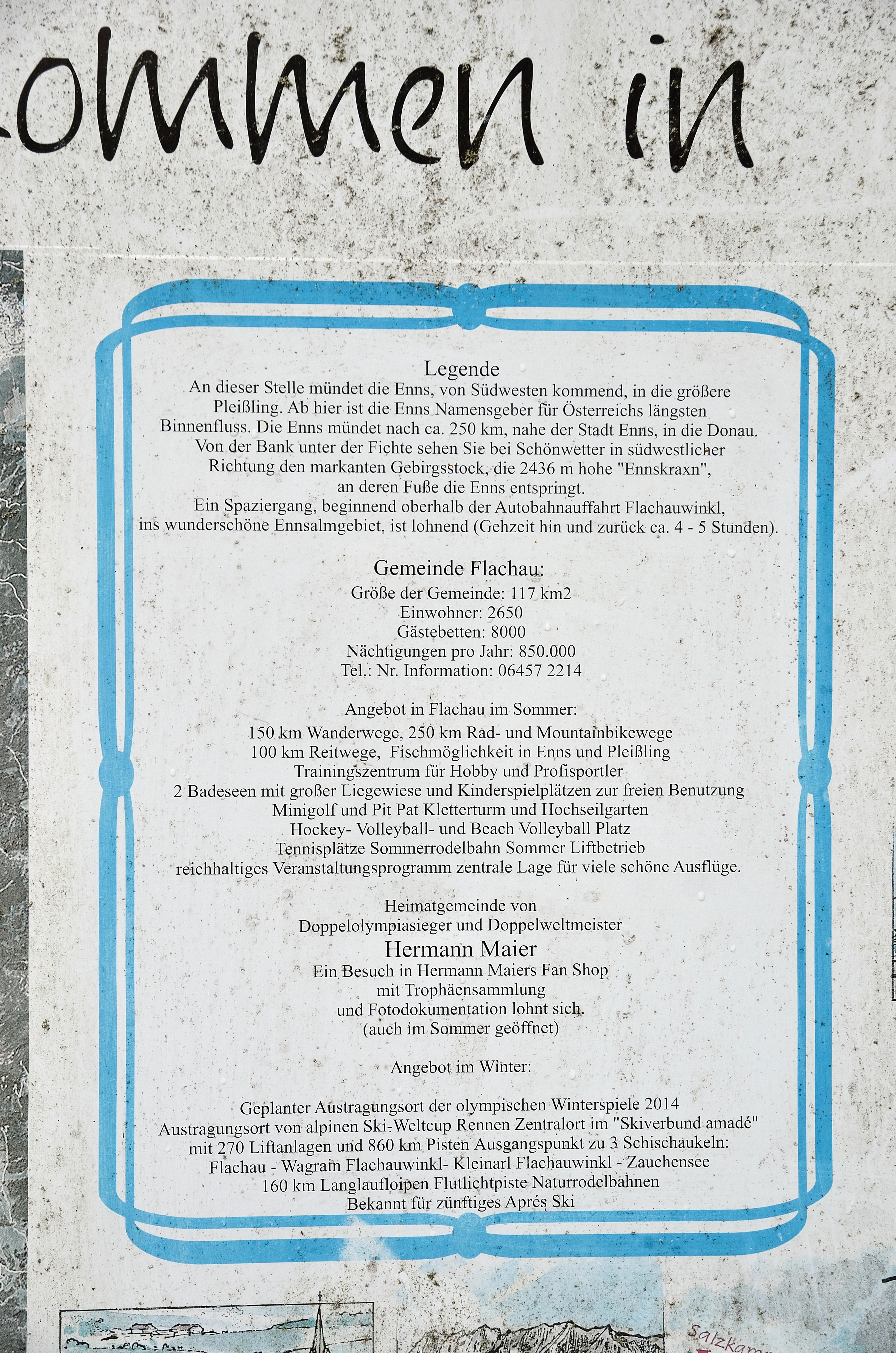 Am Beginn des Ennsradwegs in Flachau in Salzburg, dort wo die (kleinere) Enns von links in die Pleißling mündet und ab da Enns heißt.